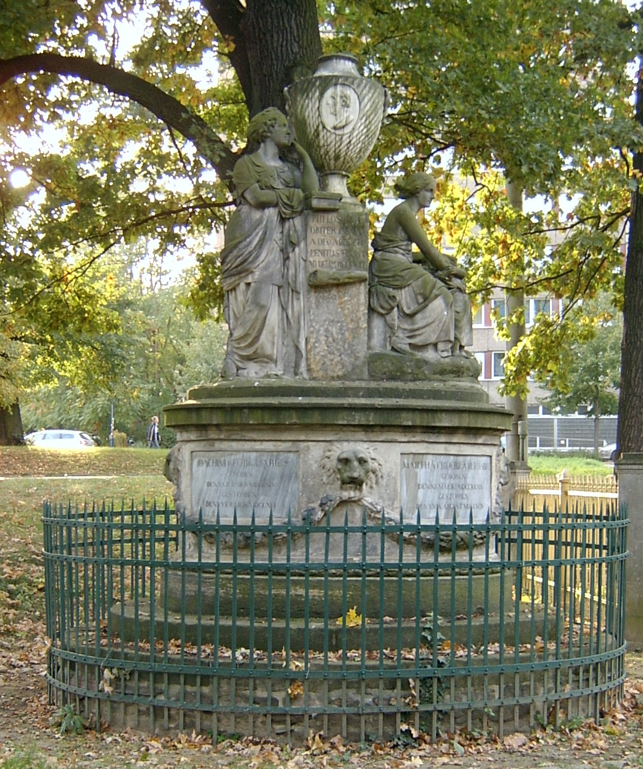 Denkmal für Joachim Georg Darjes und dessen Frau Marta Friderica Reichardt. Gelegen im Park nördlich der Gertraudenkirche. Das Heinrich von Kleist Denkmal liegt gegenüber, das Ewald Christian von Kleist-Denkmal rechts daneben Denkmäler in Frankfurt (Oder)